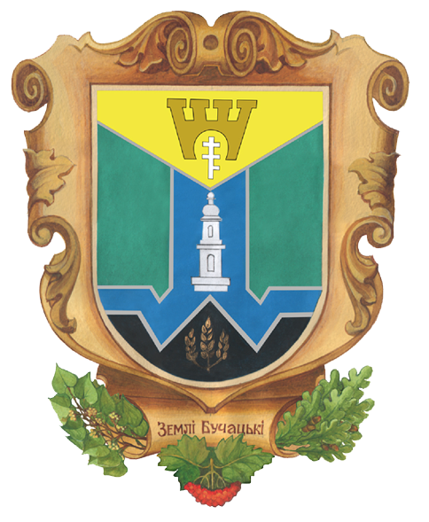 Герб Бучацького району